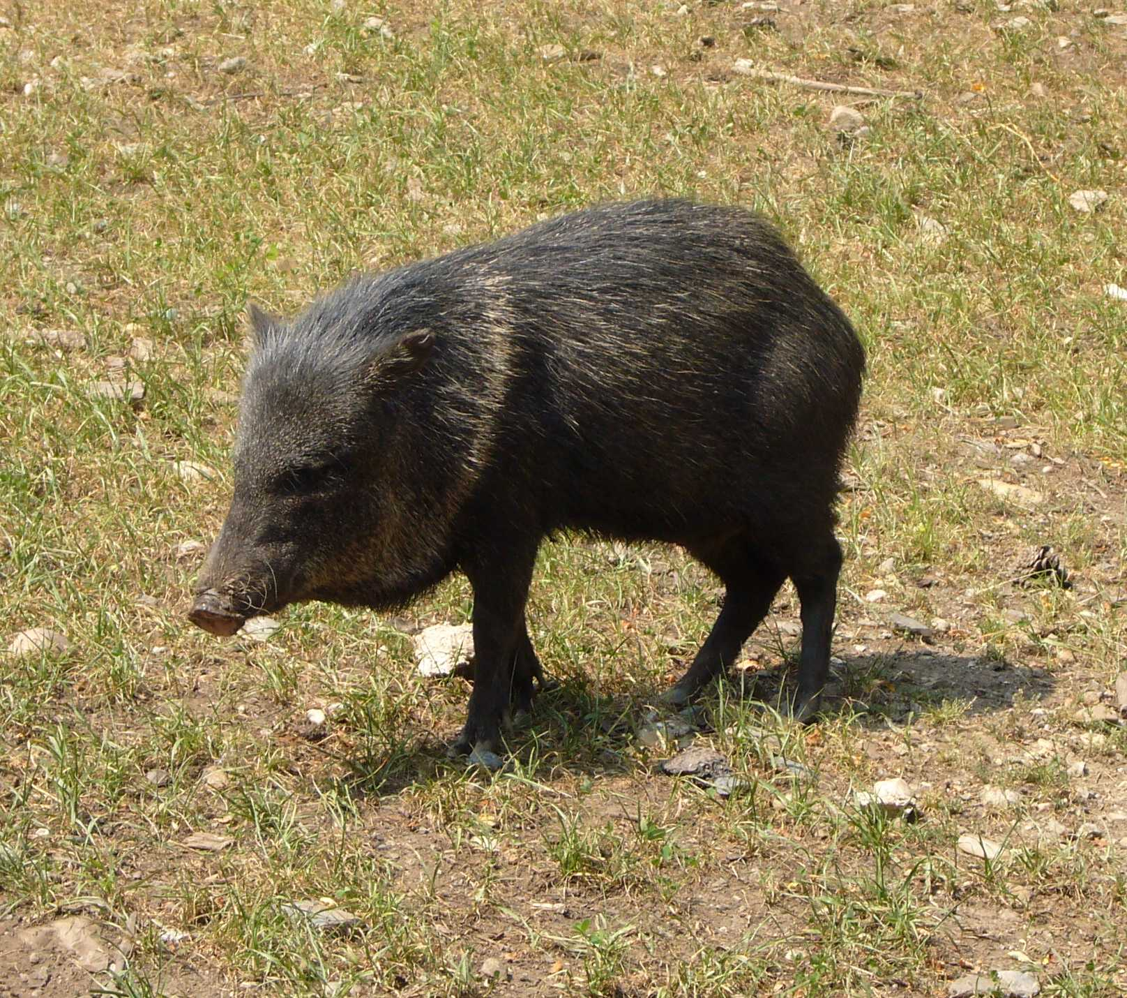 Pekari páskovaný (Zoo Praha)